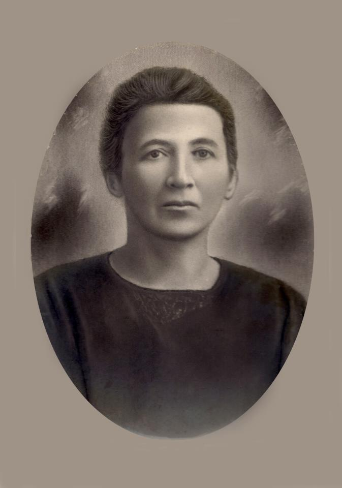 נחמה פוחצ'בסקי הייתהאיכרה, סופרת, שופטת וסופרז'יסטית מחלוצות ראשון לציון.